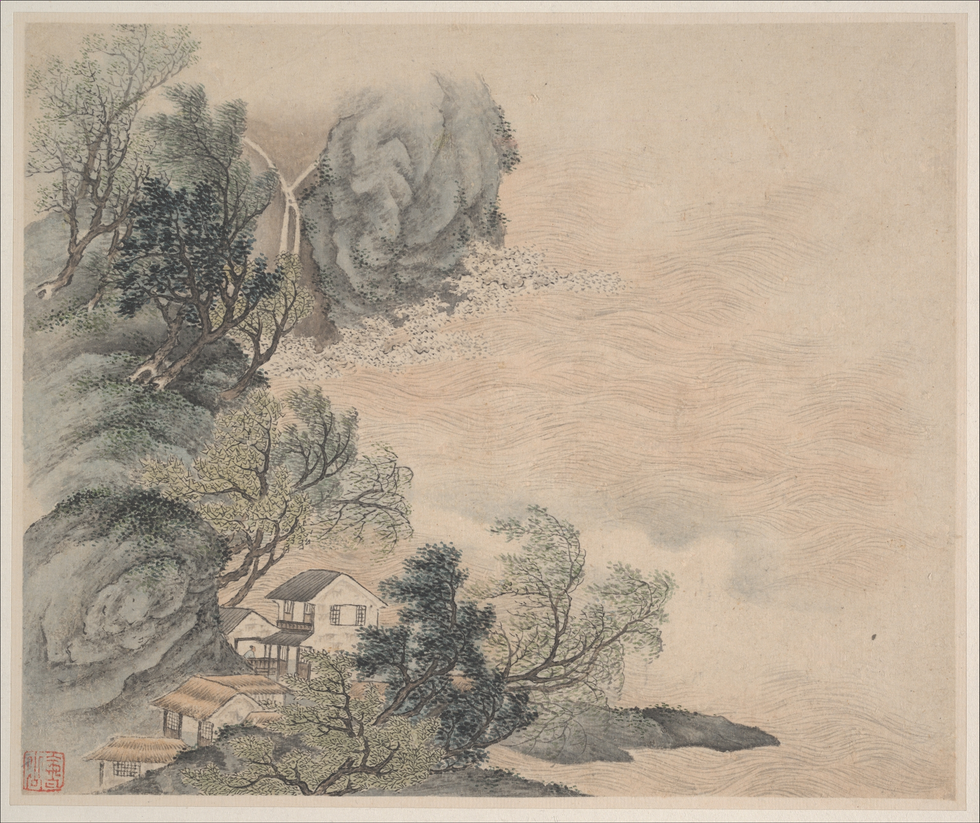 China; Album; Paintings